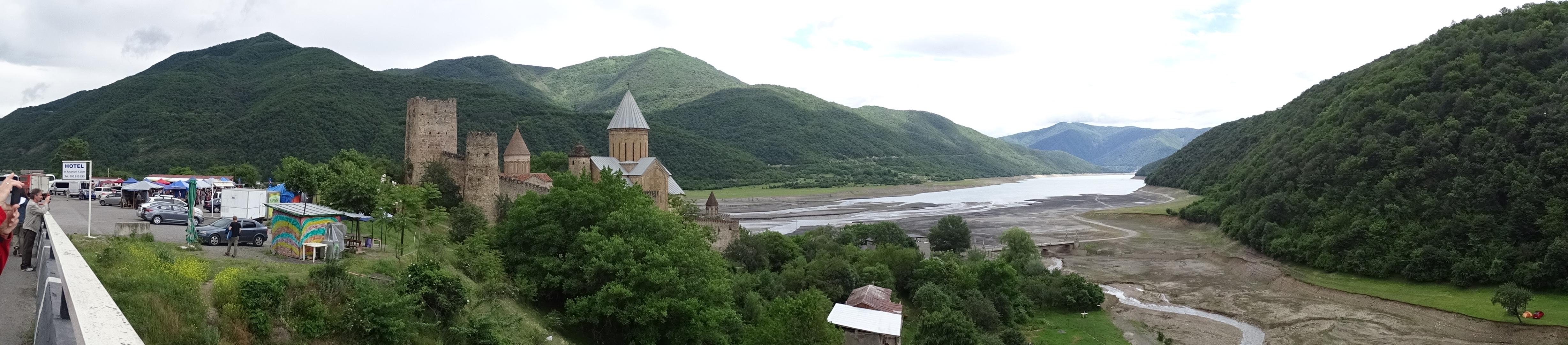 V. l. n. r. Brückengeländer, Parkplatz und Markt, Festung Ananuri, Schinwali-Stause, im Vordergrund die alte Heerstraße mit der alten Ananuri-Brücke, steht. Jenseits des Sees Avenisi, Nebenzufluss